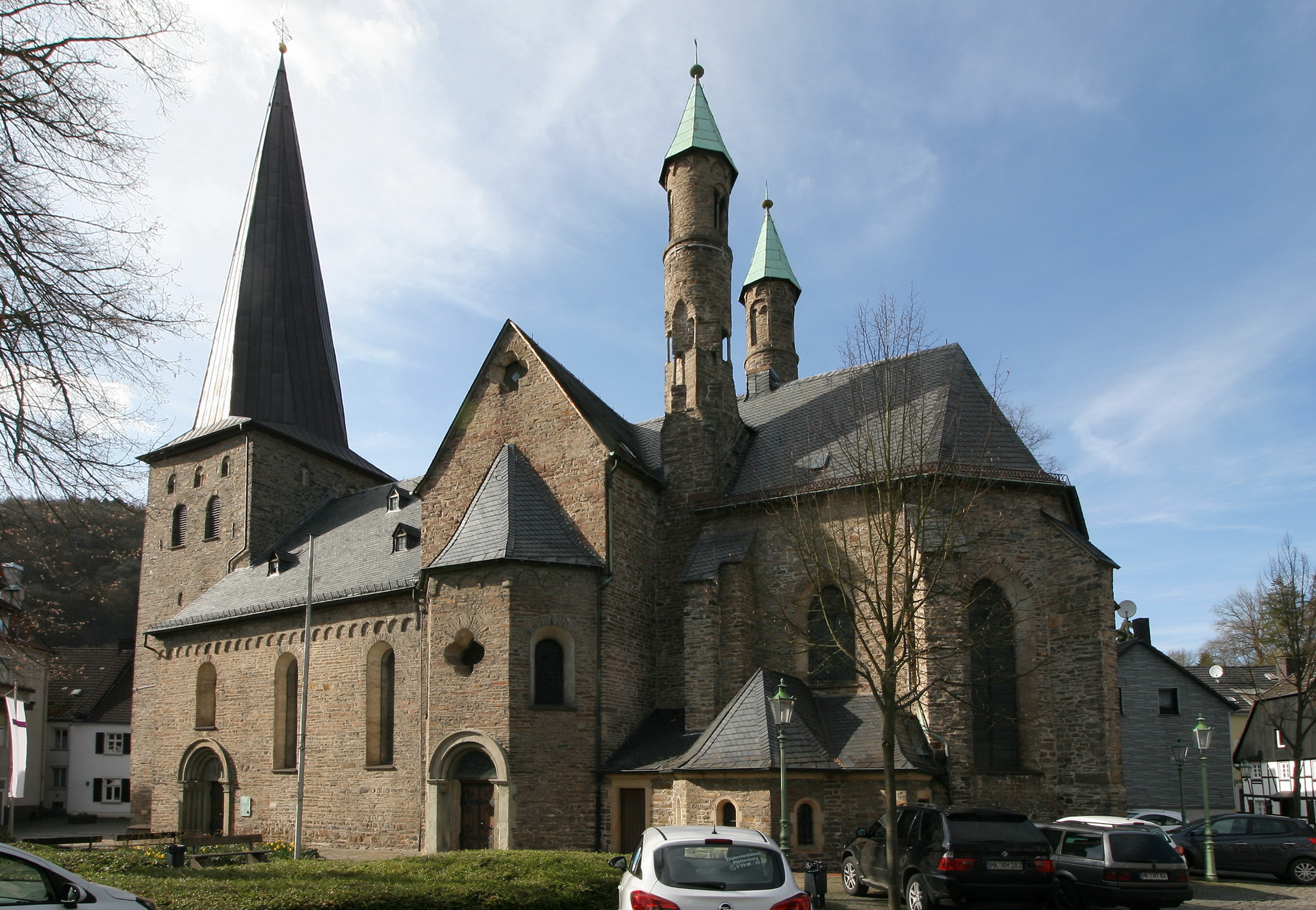 Evangelische Christuskirche in Plettenberg, Kirchplatz 9 (ehemalige Lambertuskirche). This image shows a heritage building in Germany, located in the North Rhine-Westphalian city Plettenberg (no. 9).